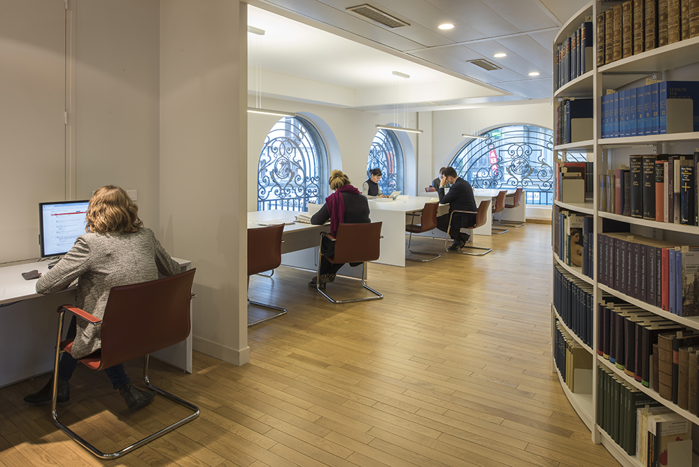 Lesesaal der Bibliothek des DFK Paris © DFK Paris/Markus Schilder